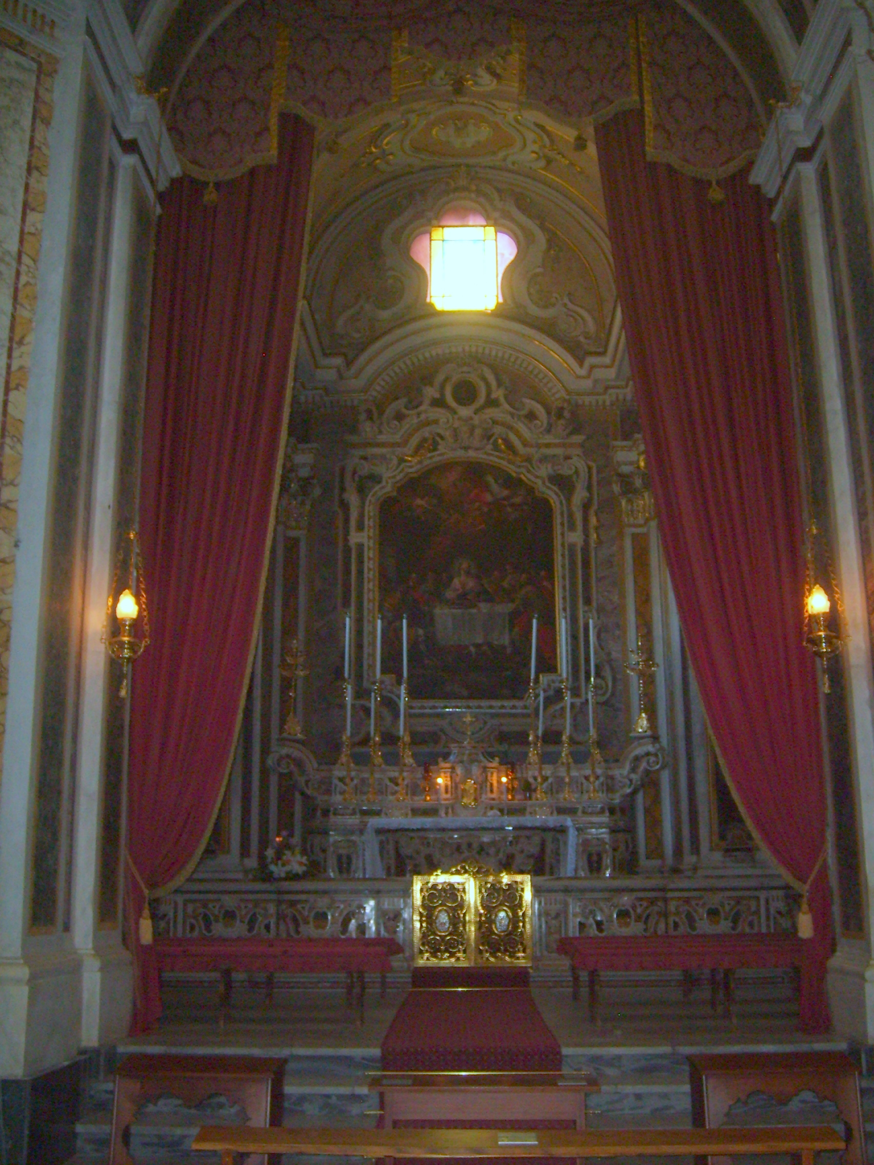 Cappellone del Santissimo Sacramento della chiesa matrice di Francavilla Fontana